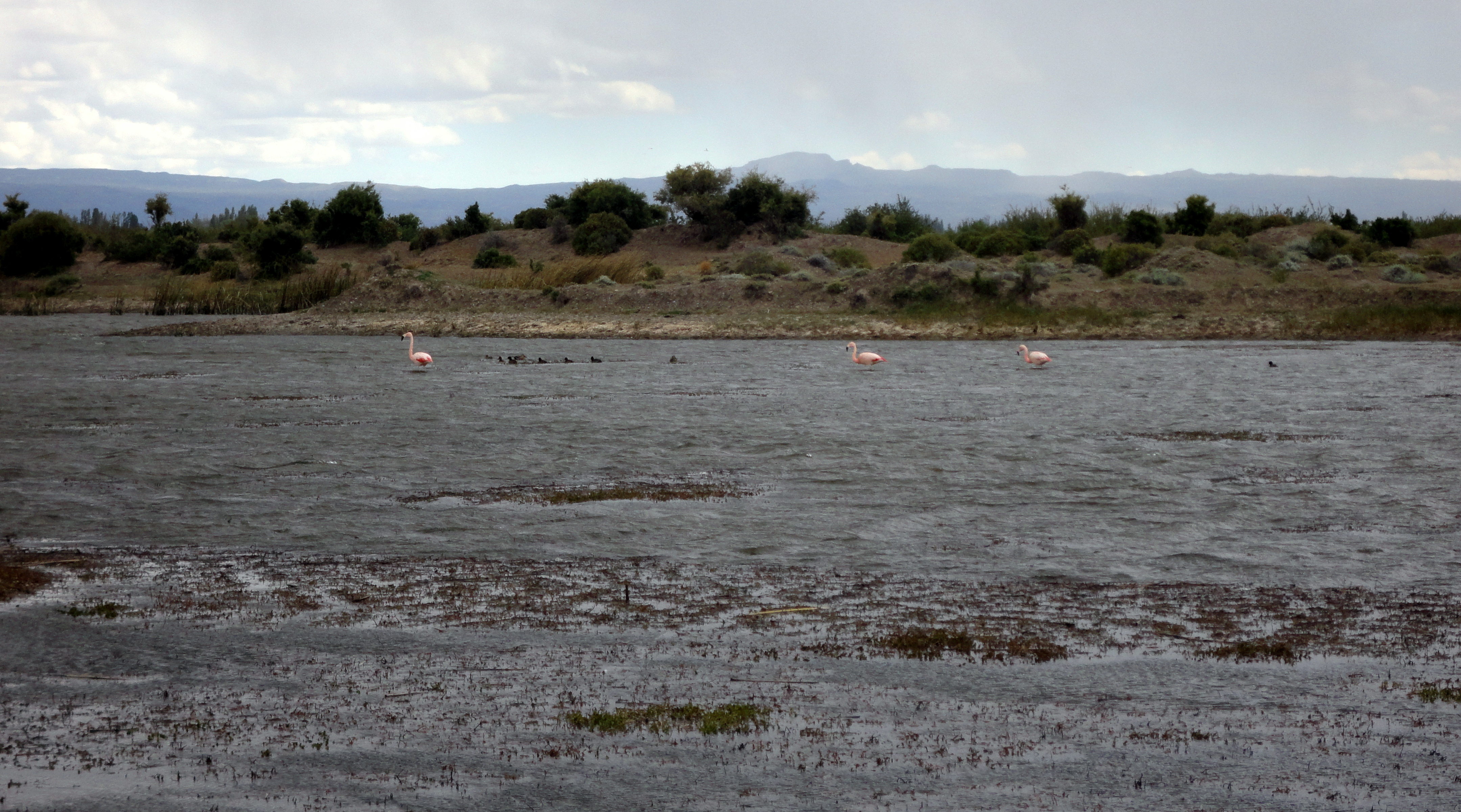 Fauna del oasis de Sarmiento